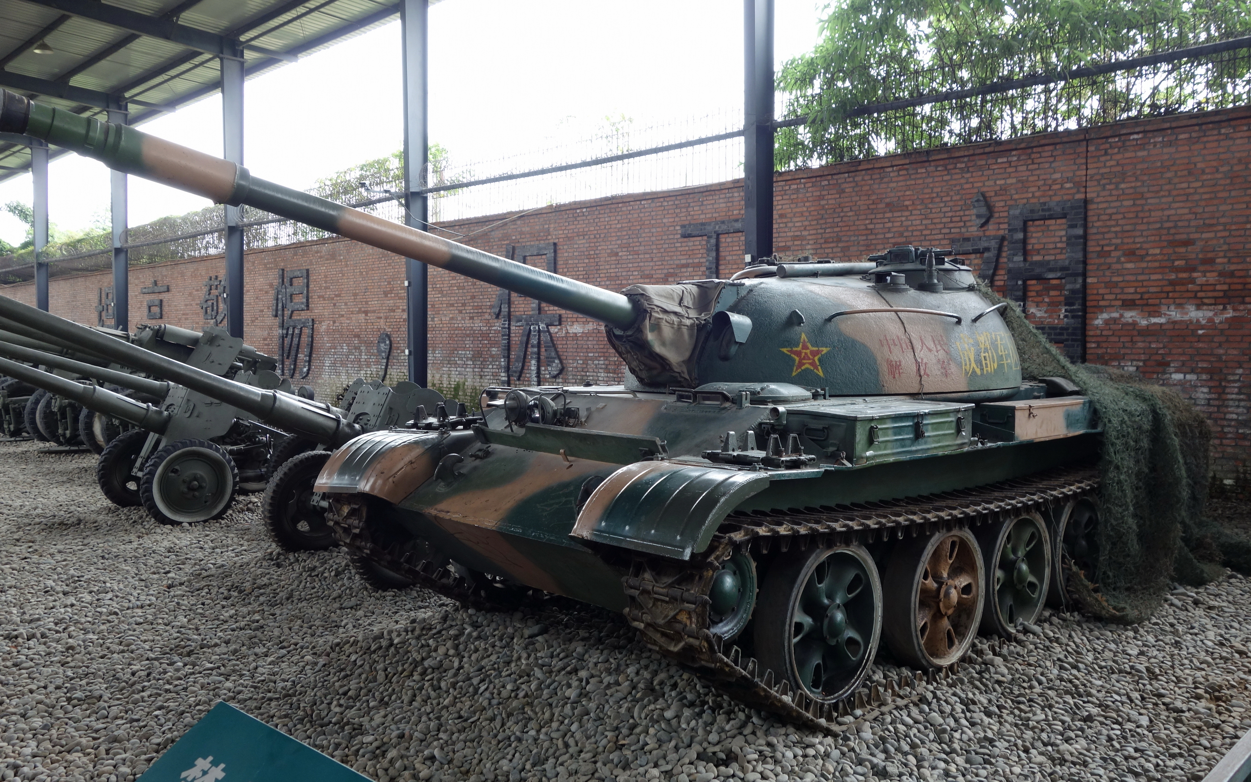 62式轻型坦克，收藏在建川博物馆。